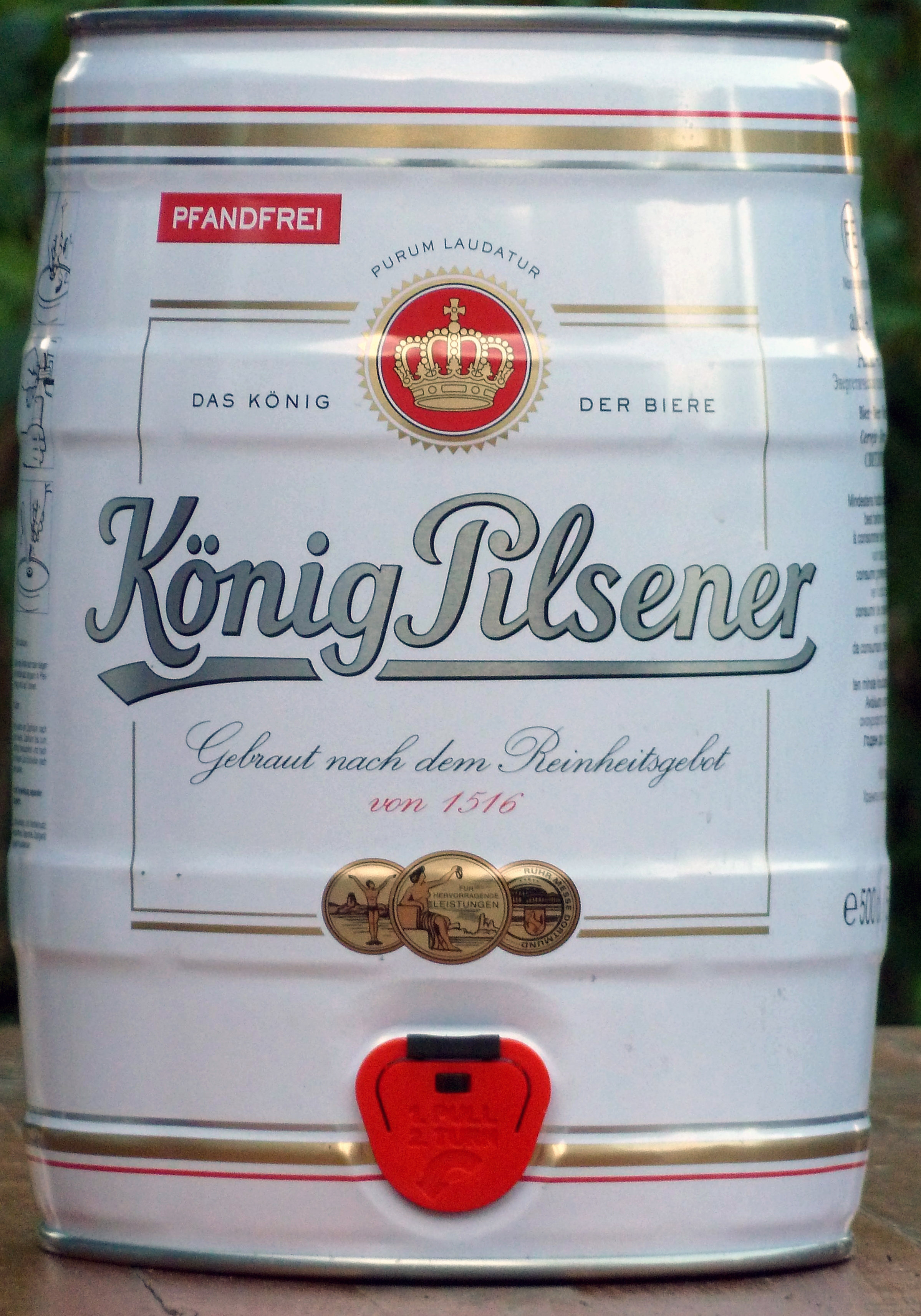 Logo von